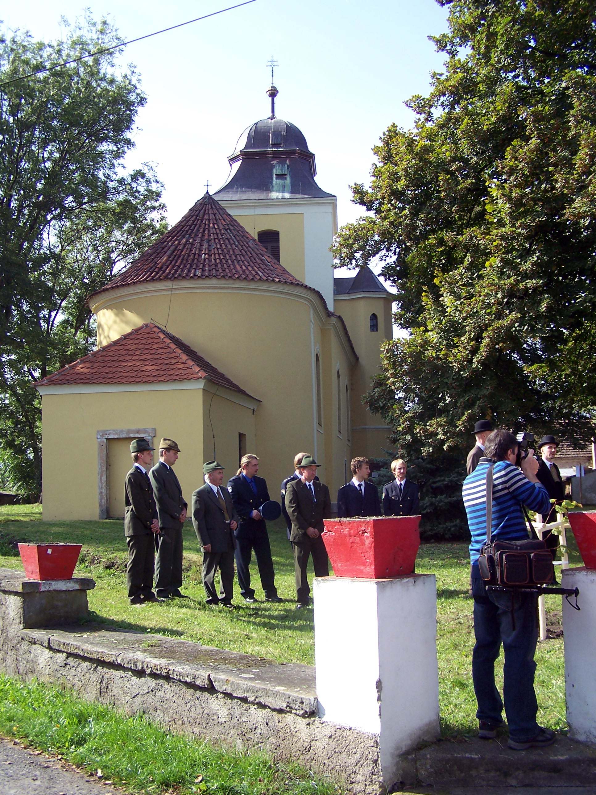 Kostel svatého Jakuba Většího (Ratenice). V popředí sázení památného stromu při oslavách 670 let od první písemné zmínky o existenci obce.